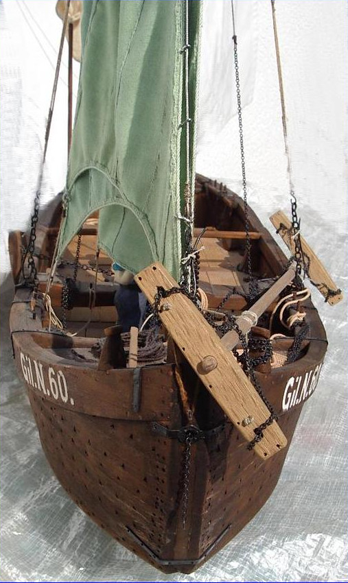 Modell eines Keitelkahns - Bugansicht. Auf dem Bug ist der Keitelbaum abgelegt - an dessen Botten wurde das Keitelnetz befestigt (bzw. mit dessen Hilfe aufgespannt).